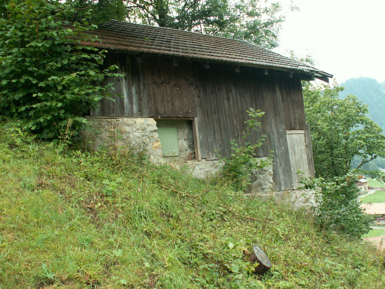 Beobachtung der Sperre Im Fang